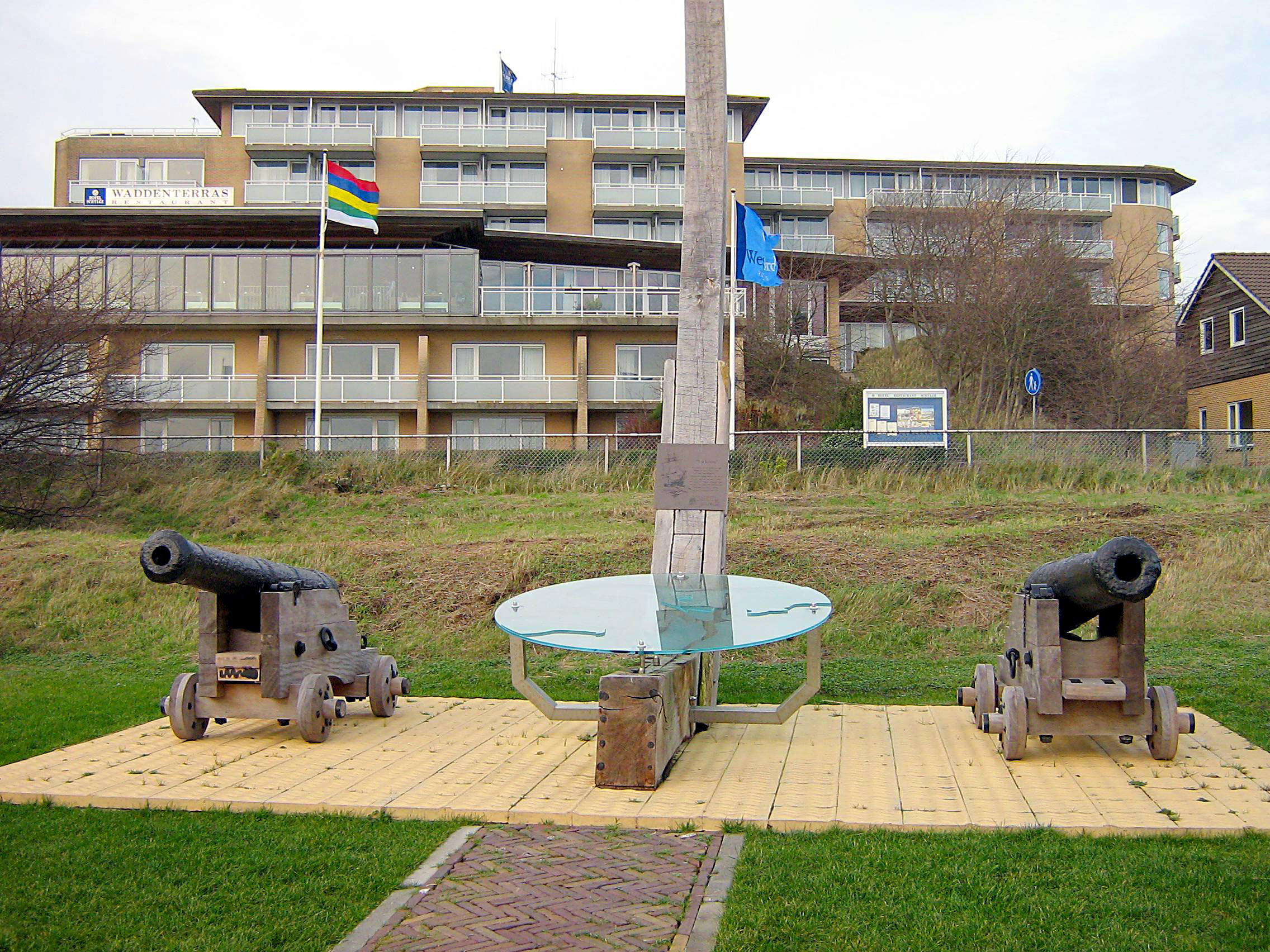 Kunstenaar onbekend,2005